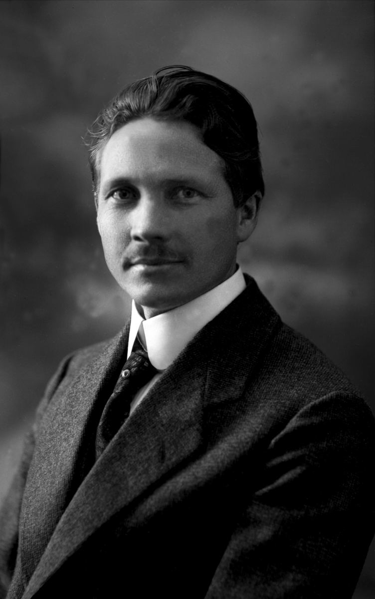 Maleren Enevold Thømt fotografert av Gustav Borgen 17. april 1915. Inventarnummer hos Norsk folkemuseum: NFB.11916.